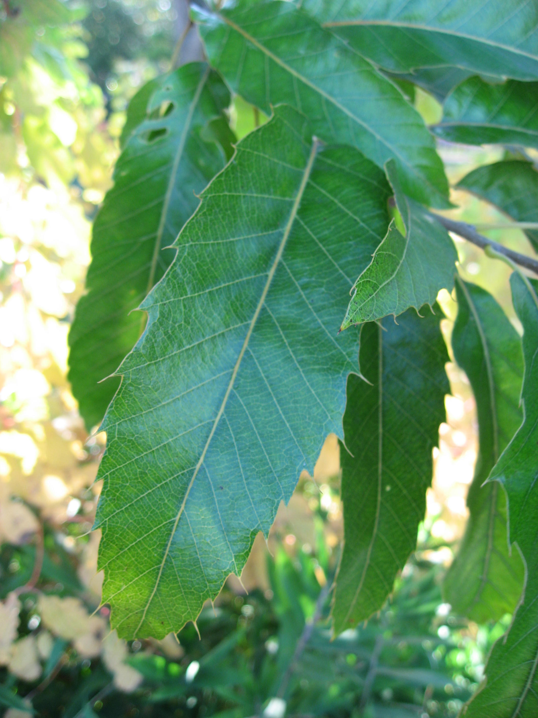 Quercus acutissima in Serres d'Auteuil Map: 48° 50' 49" N 2° 15' 8" E